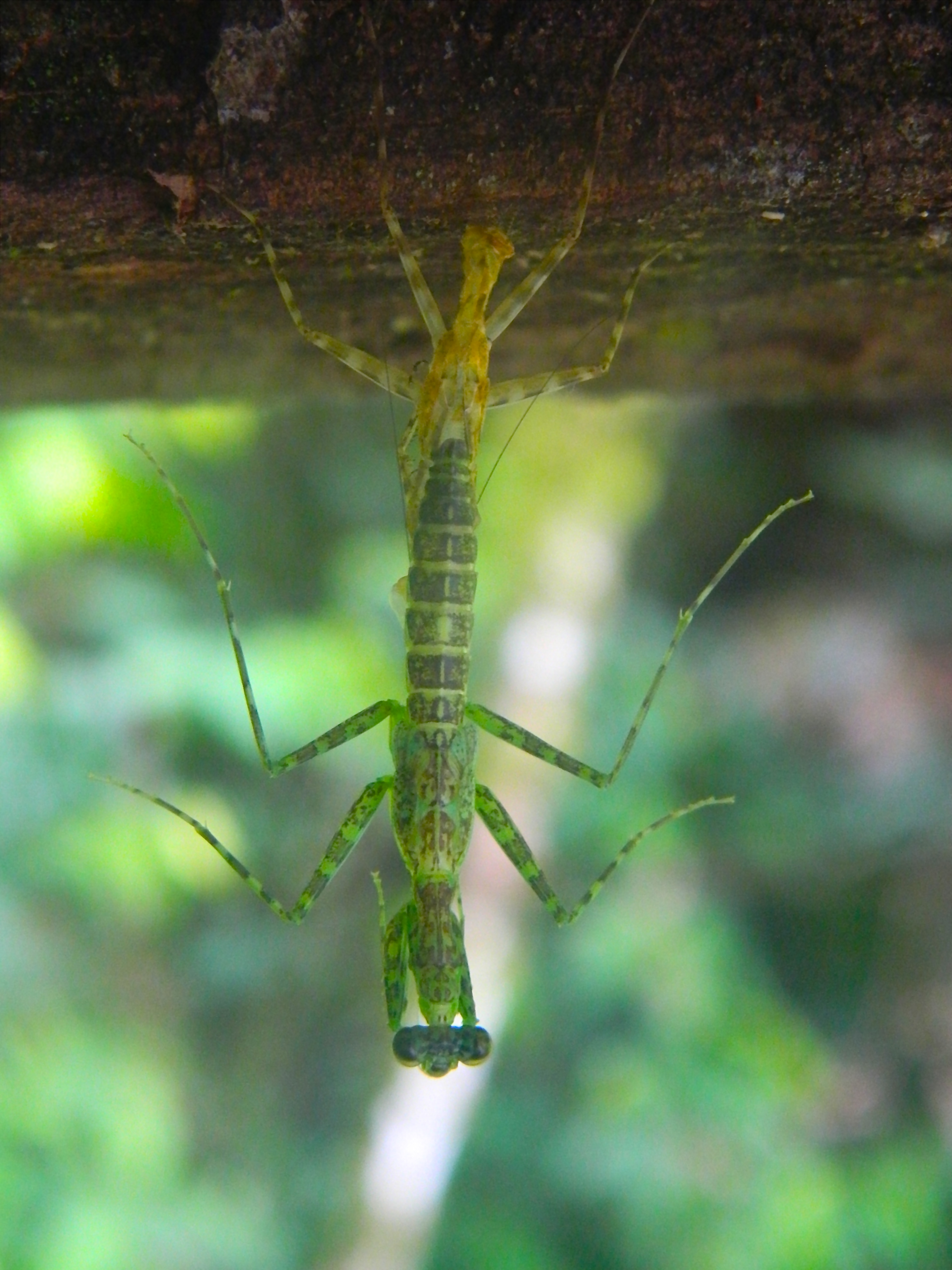 Molting Liturgusa